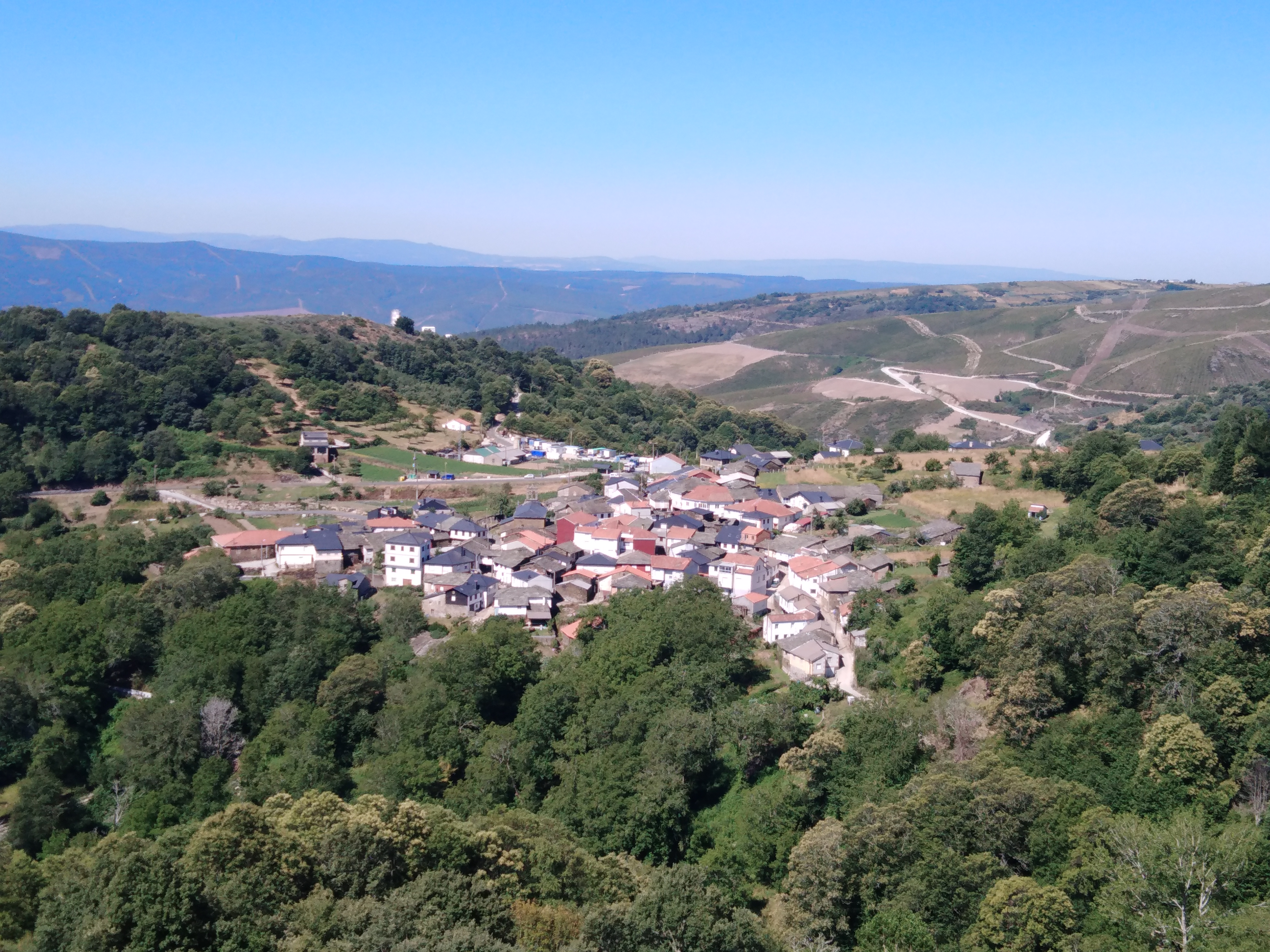 Vista de Cerdedelo (Laza)